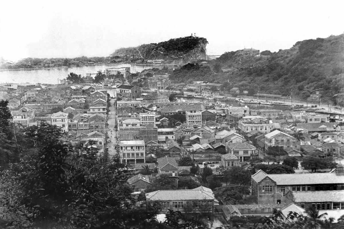 中文（台灣）: 哈瑪星 (濱線) 舊貌